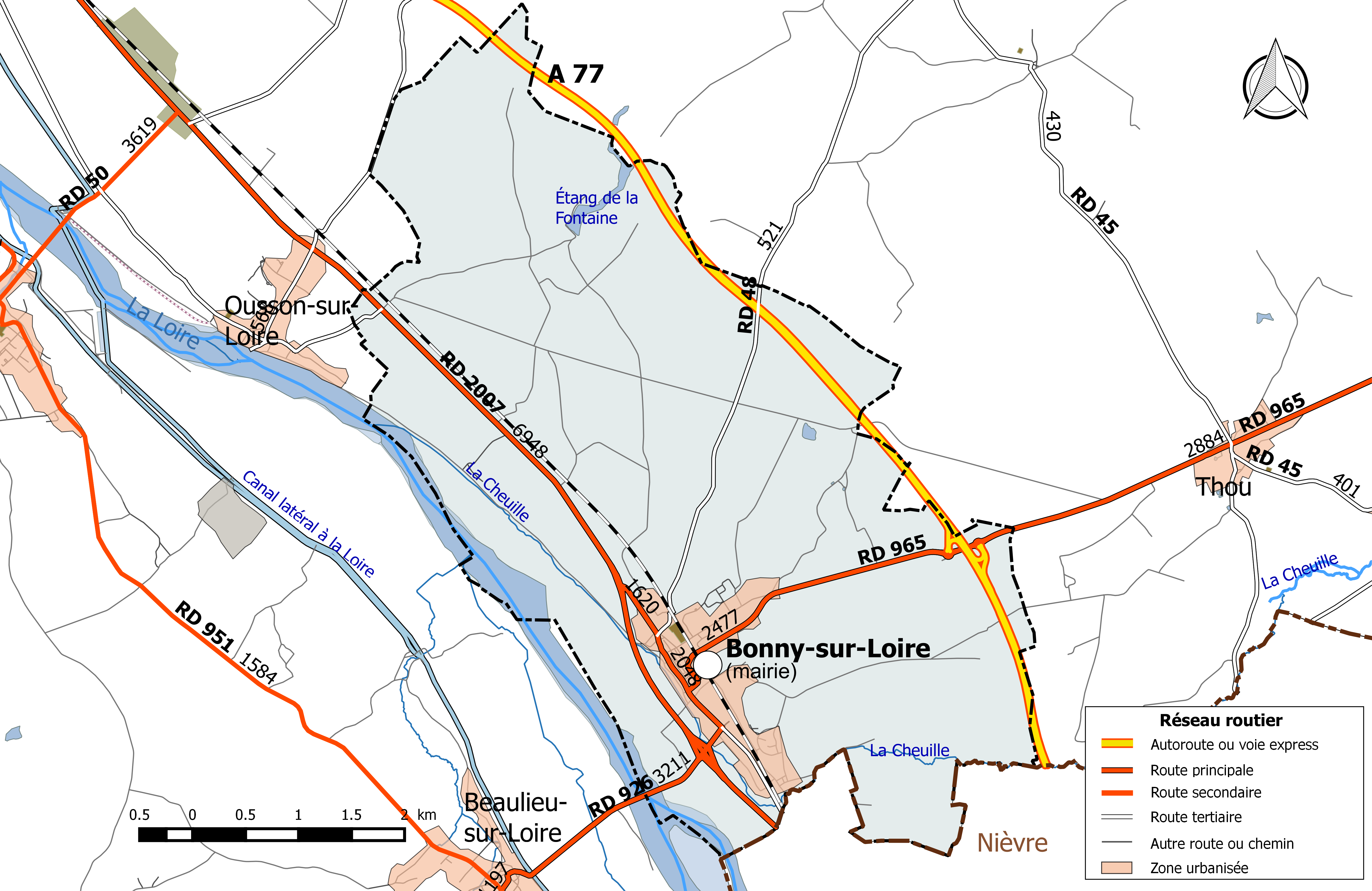 Carte du réseau routier de la commune de Bonny-sur-Loire.